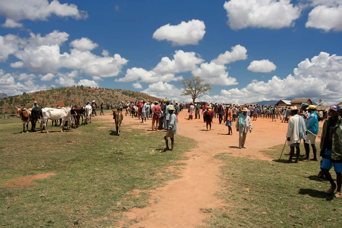 Madagascar's largest zebu market at Ambalavao.